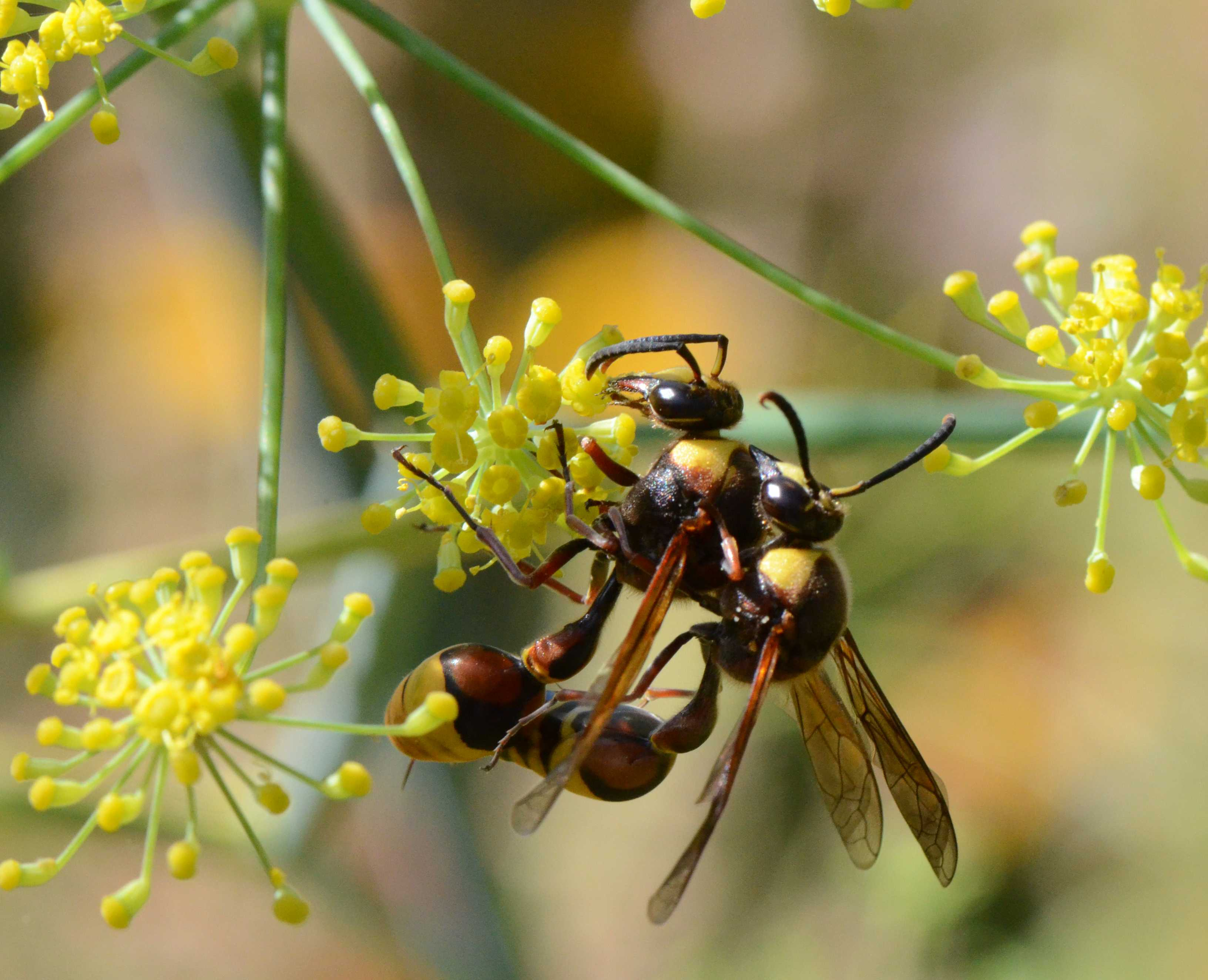 Delta unguiculata, eumènes unguiculés, guêpes maçonnes : accouplement. Charente, France